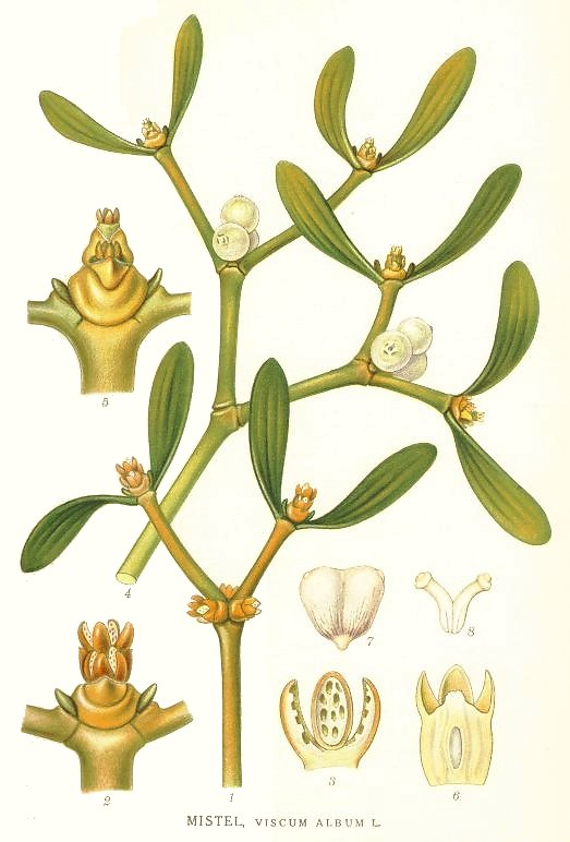 Original Description Mistel, Viscum album L.